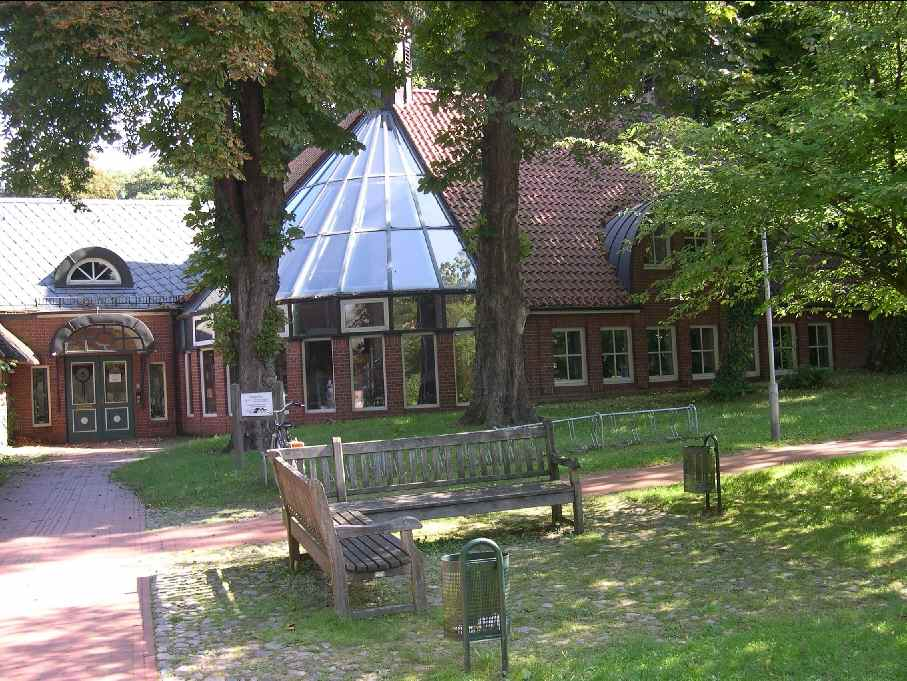 Worpswede Rathaus